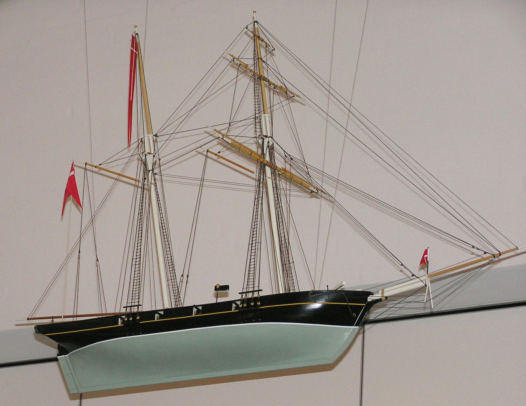 ’Elben’, 2 master topsejlsskonnert bygget af maler Ove Andersen, Slagelse 2003 - 2005 Doneret 24.september 2005 til Antvorskov Kirke, Agersøvej 86,4200 Slagelse af Marineforeningens Slagelse afdeling, med bidrag fra Sparekassen Spar Trelleborg, Slagelse. Jyske Bank, Slagelse. Profil Optik, Slagelse. Ollerup Maskinfabrik, Slagelse. Tømrermester Georg Berg, Slagelse. Slagelse Rotary Klub. Den A.P.Møllerske Støttefond. I skibets skrog er der lagt en forside af Marineforeningens medlemsblad, bestyrelsens navne samt 5 kroner Skonnerten blev bygget på Nyholm og søsat 1831. Nyholms kraner har nu Operahuset som nabo. Konstruktør var fabriksmester A Schifter. Elben, blev udrustet første gang i 1838 og udgik af flådens tal i 1858. Blev ophugget 1861. Skibet, der skulle være vagtskib på Elben, var armeret med 8 korte 12 pundige kanoner. Besætningen var på 40 mand